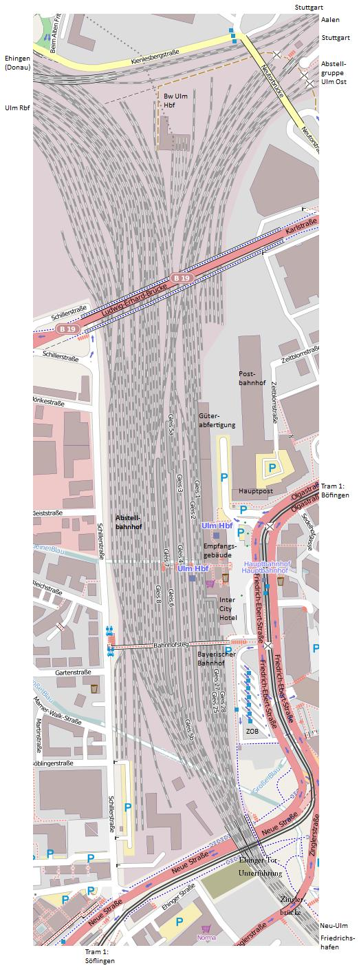 Karte des Ulmer Hauptbahnhofs mit den umliegenden Straßen